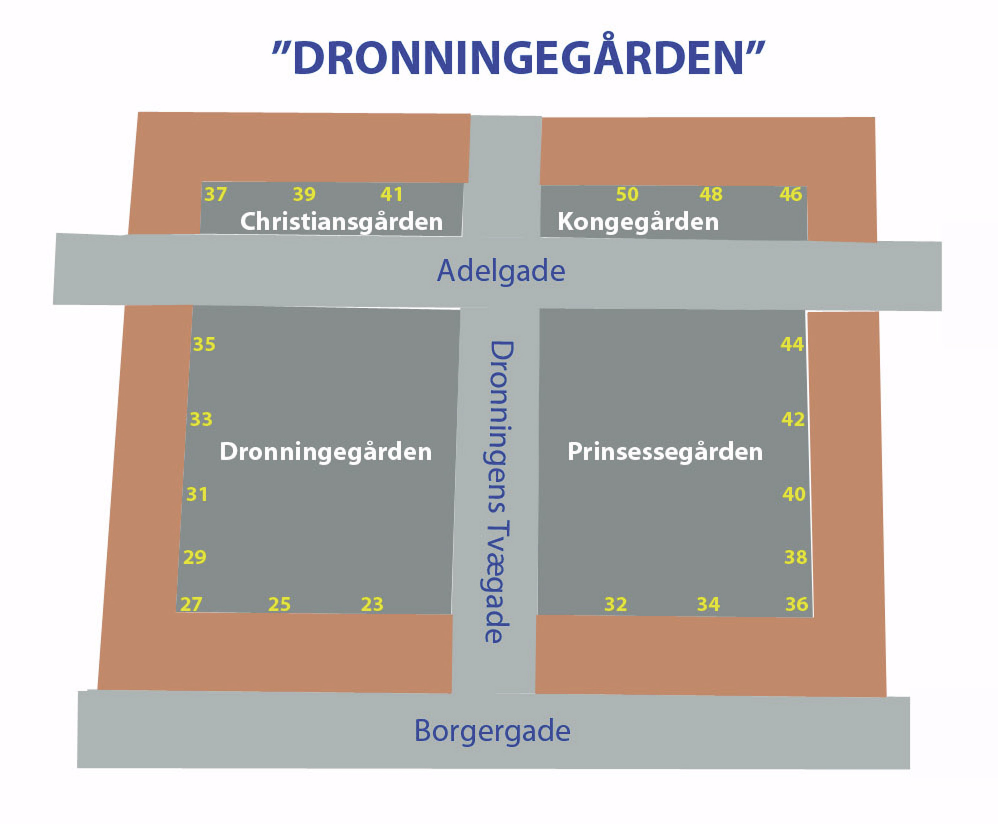 Fredet byggeri i fire adskilte komplekser omkring krydset mellem Adelgade og Dronningens Tværgade, opført i 1940'erne og 1950'erne